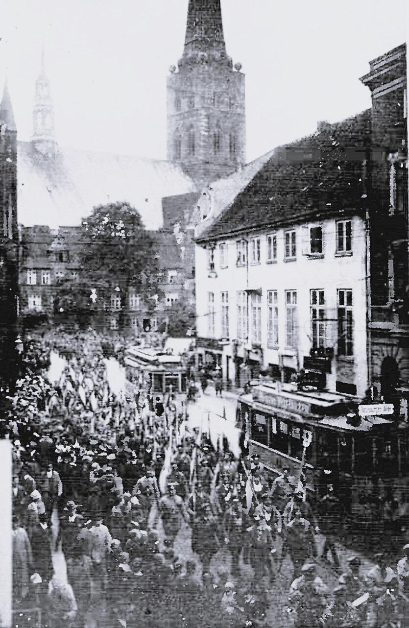 Der Festmarsch der über 5000 Teilnehmer mit mindestens 100 Fahnen, und mehreren Musikkapellen ehemaliger durch die Stadt zum Hindenburghaus. In der Burgstraße marschierte der etwa 2km lange Zug an dem Bundesführer vorbei. Hier passiert ihn gerade eine Fahnenabteilung die Burgstraße.